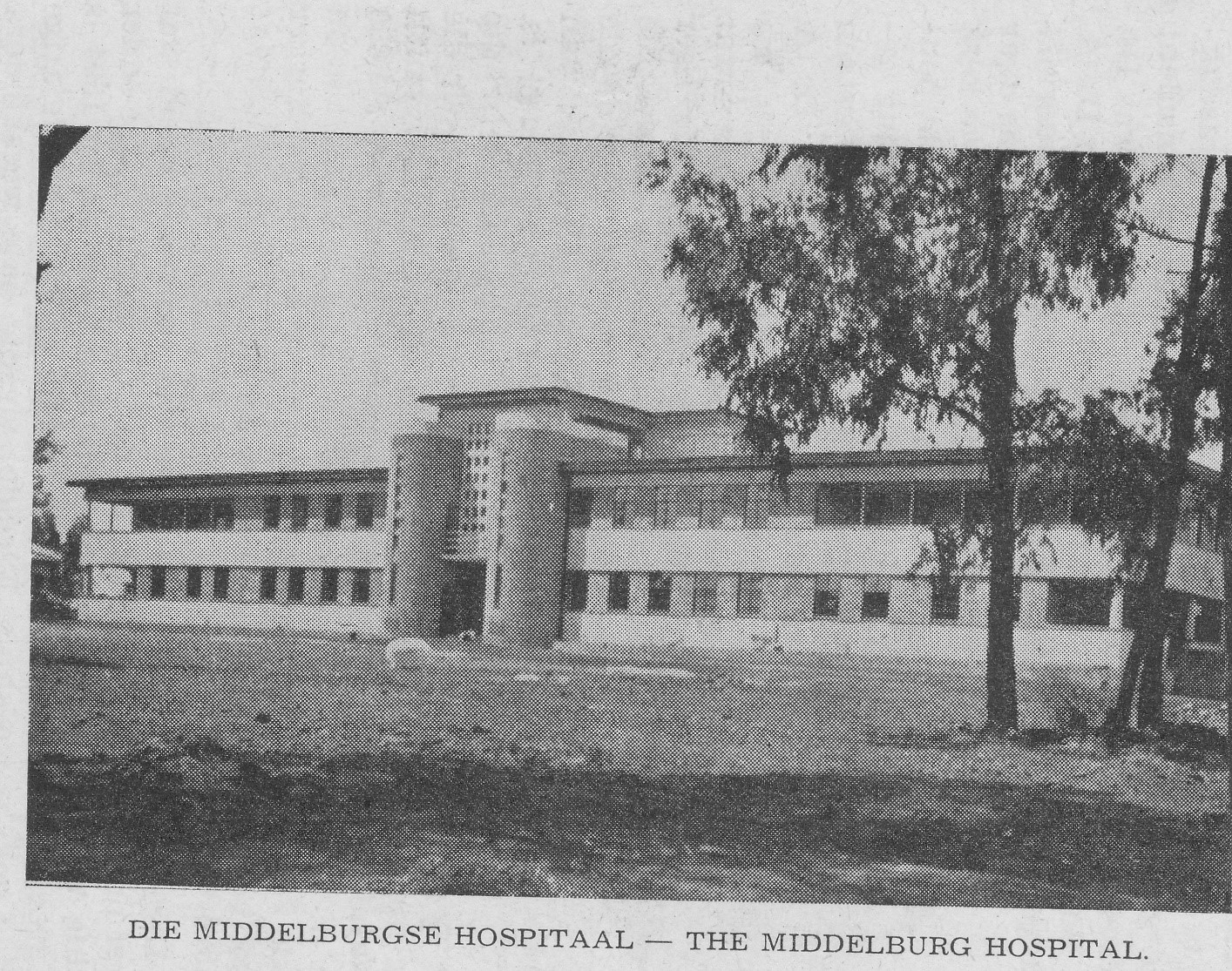 Middelburg Moerdyk-hospitaal, circa 1952 - Van Riebeeck Centenary Publication